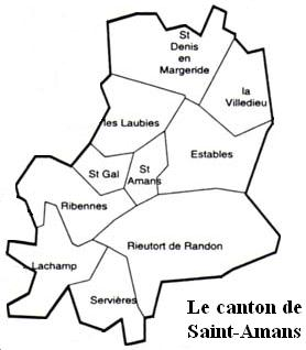 Le canton de Saint-Amans Image personnelle